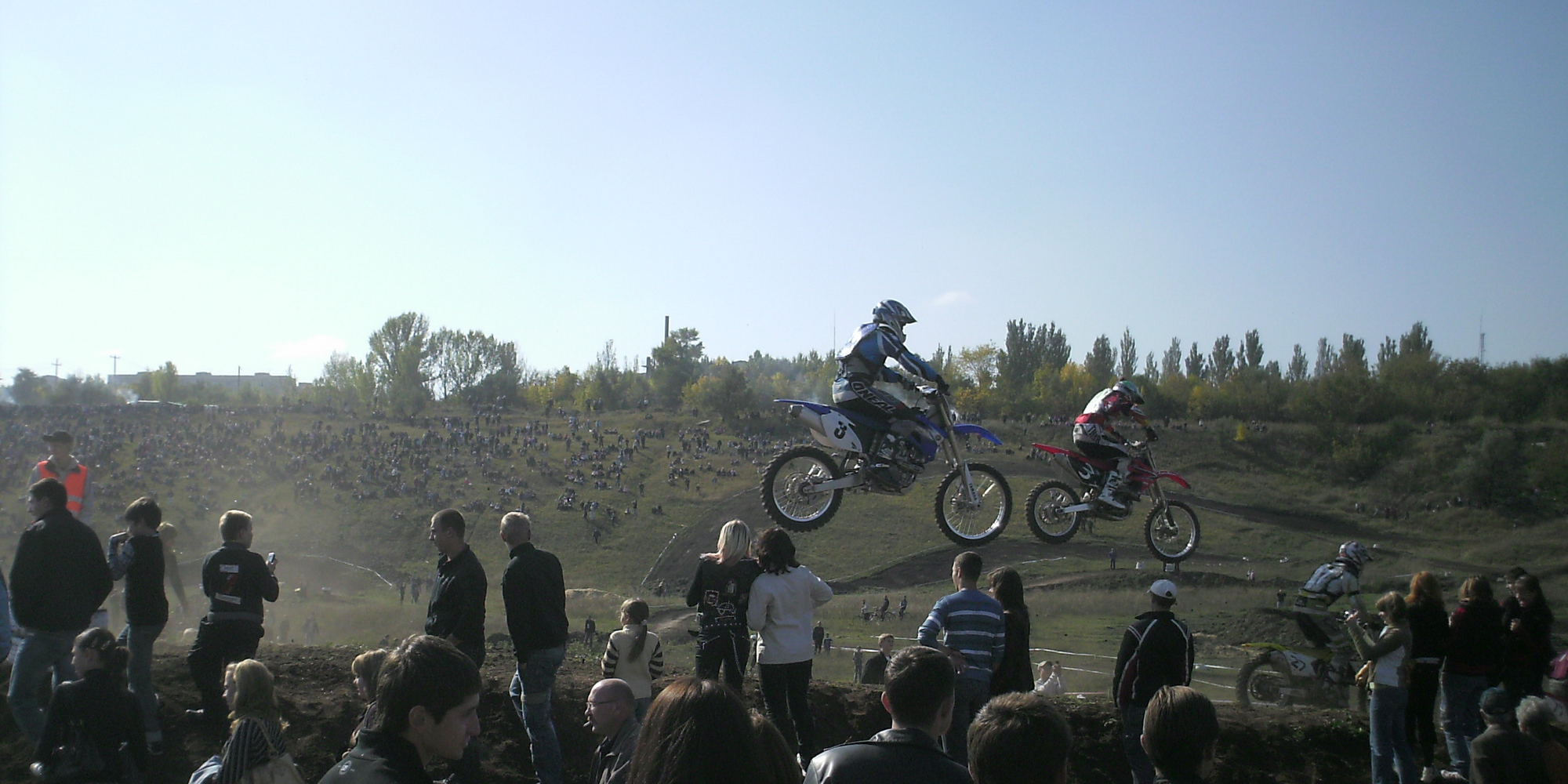 Мотокросс в Кутовой балке. Краматорск